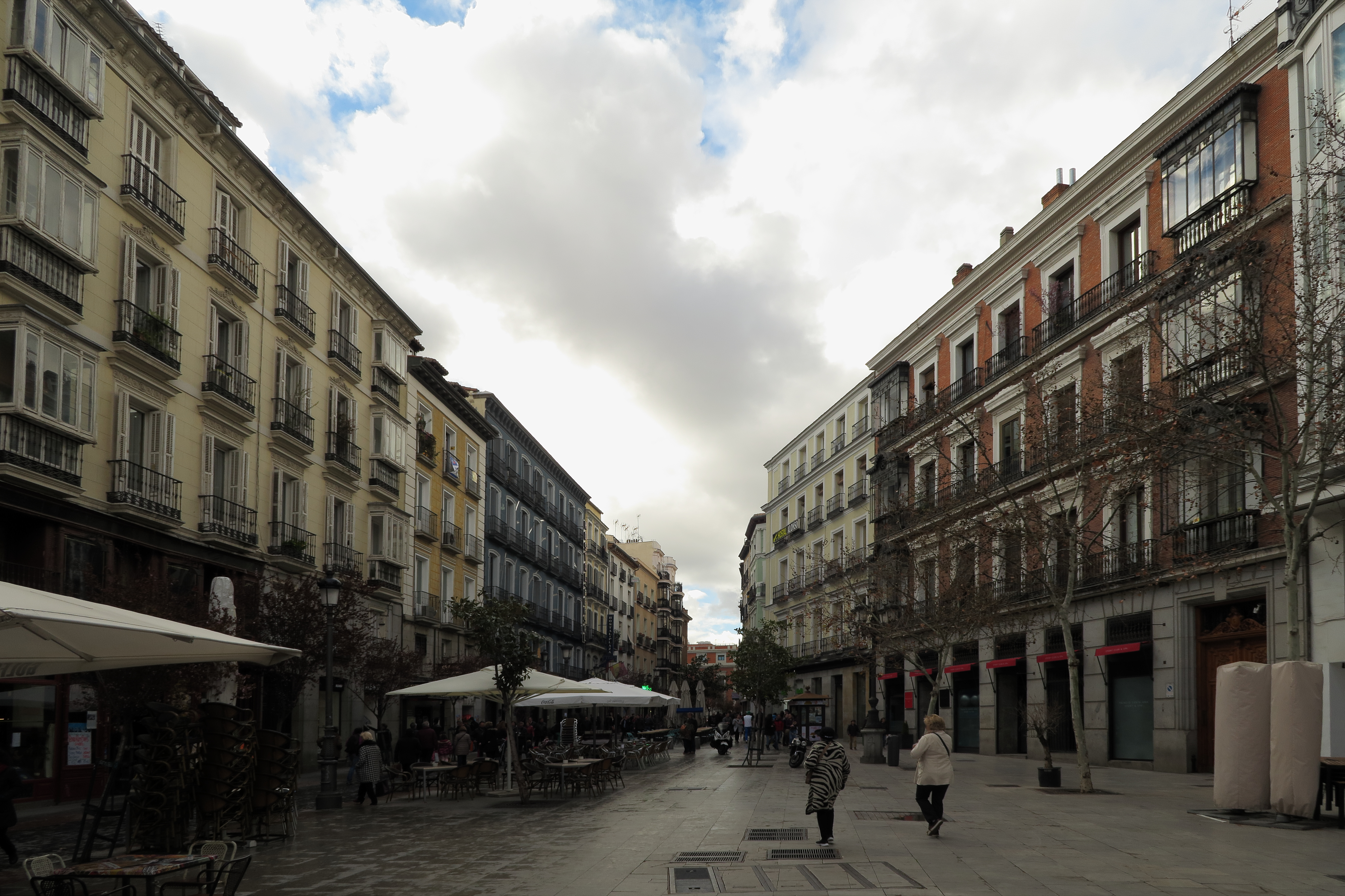 Plaza del Ángel (Madrid)